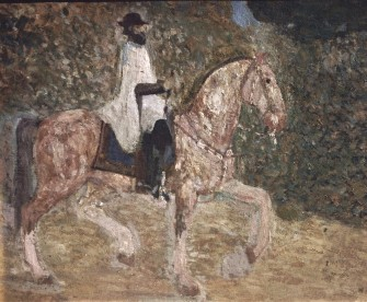 Pedro Figari - Hombre de campo (óleo s/cartón)